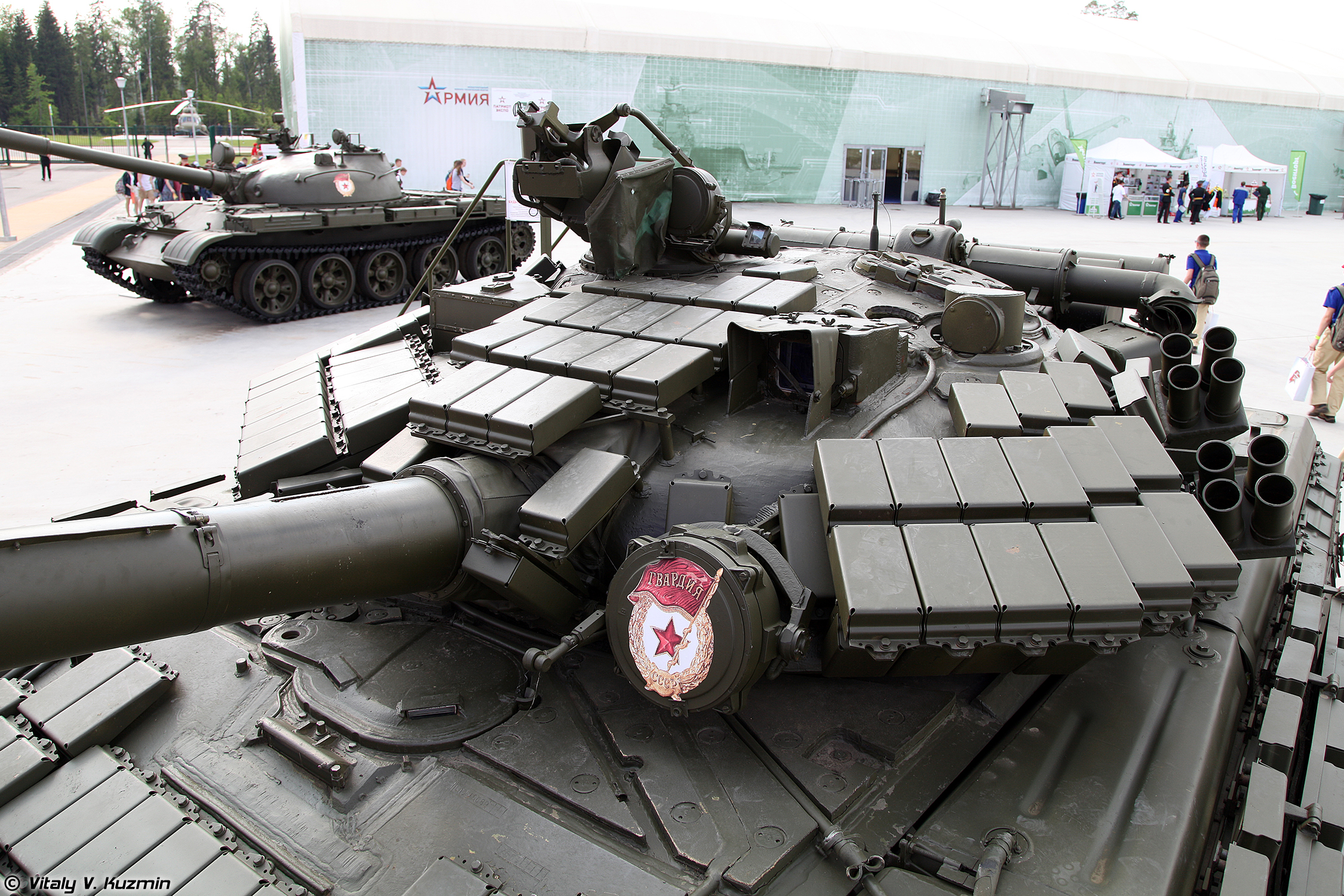 Т-64БВ образца 1987г. (T-64BV mod.1987)